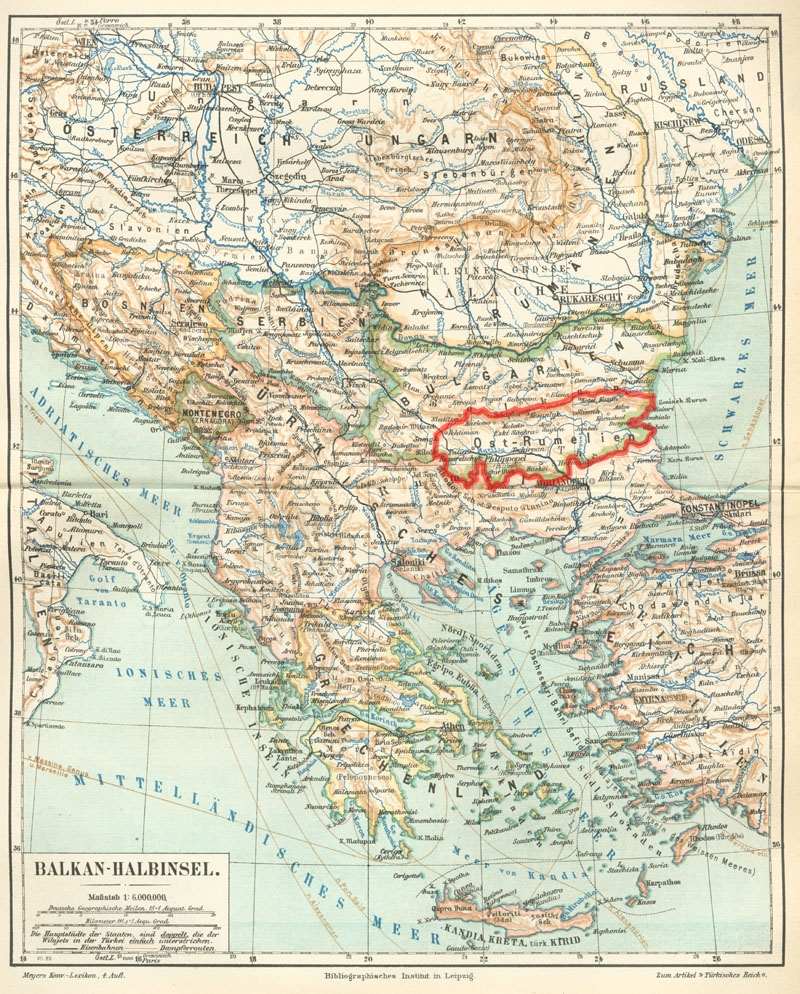 Ostrumelien